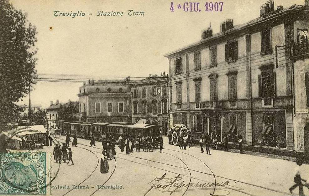 La stazione tranviaria di Treviglio, all'incrocio fra le linee Lodi-Bergamo e Fornaci-Caravaggio.